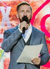 Международный фестиваль этнической музыки «Музыка наших сердец» в музее-заповеднике «Коломенское». Ведущий Оскар Кучера.